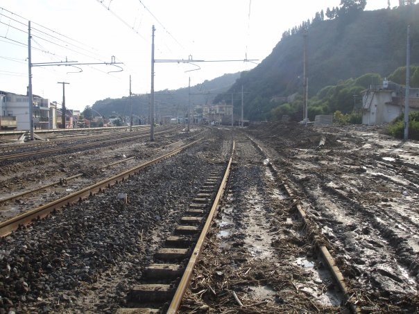 Giampilieri mudslide